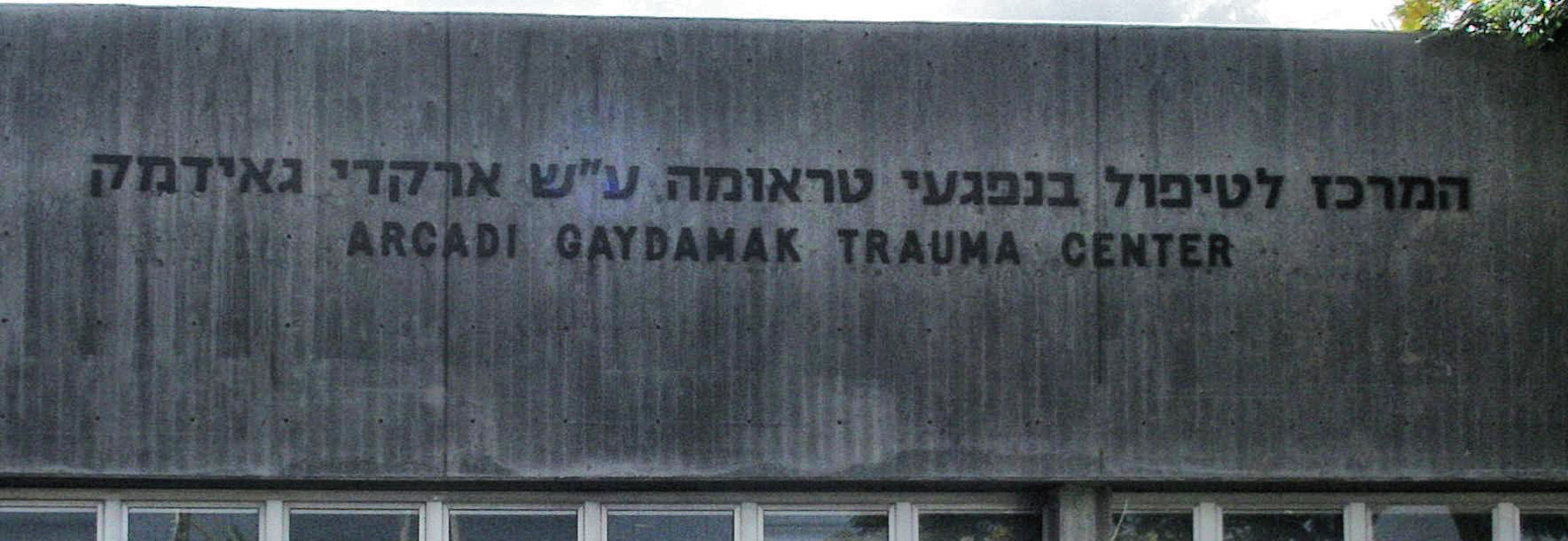 Arcadi Gaydamak Trauma Center, Sheba Medical Center